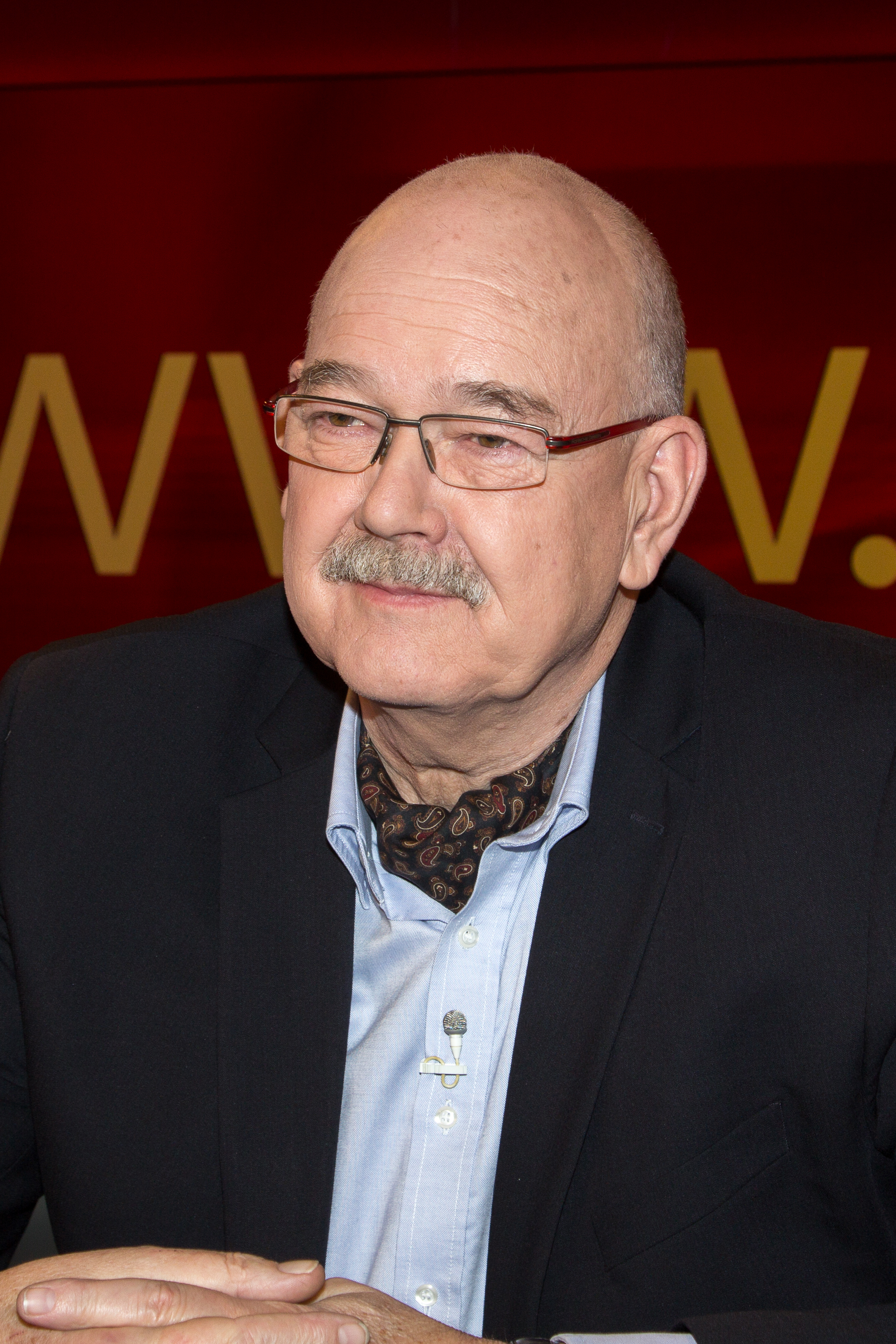 Rolf-Dieter Krause in der WDR-Sendung "hart aber fair" am 15.2.2016